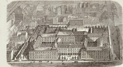 Lycée F1